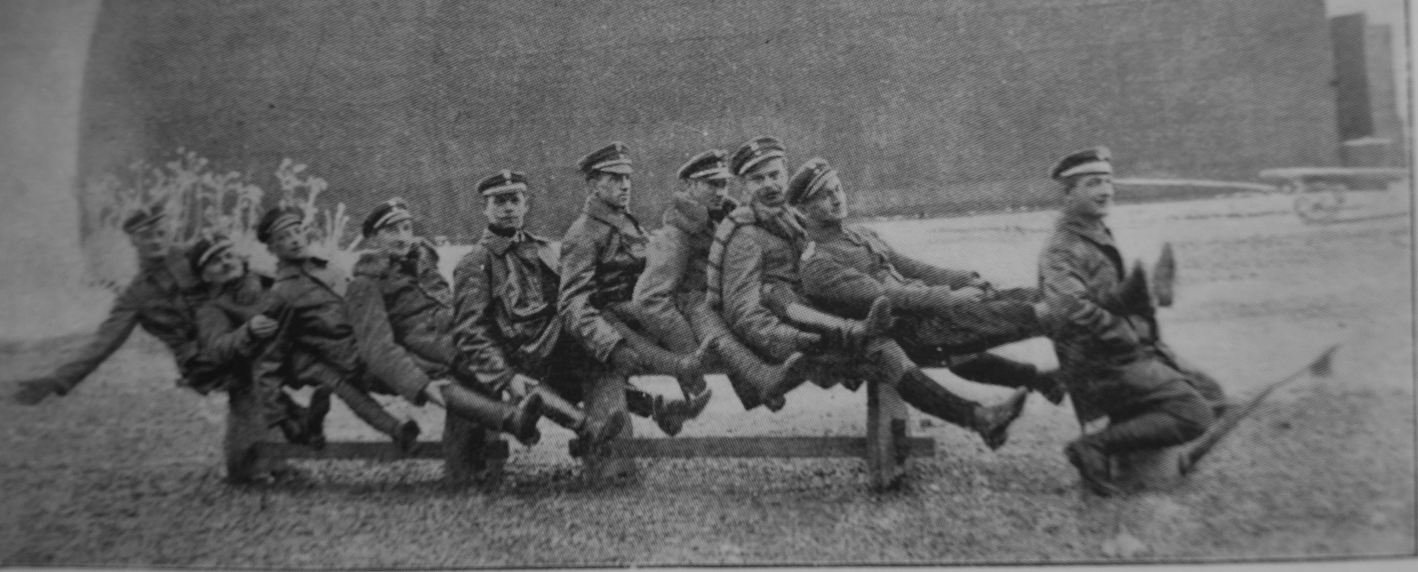 5 eskadra wywiadowcza - pierwszy personel latający na lotnisku w Hureczku; luty 1919